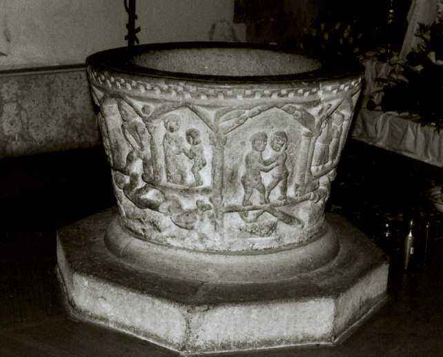 Pila bautismal prerrománica de San Juan (Guardo) - Abril de 1998